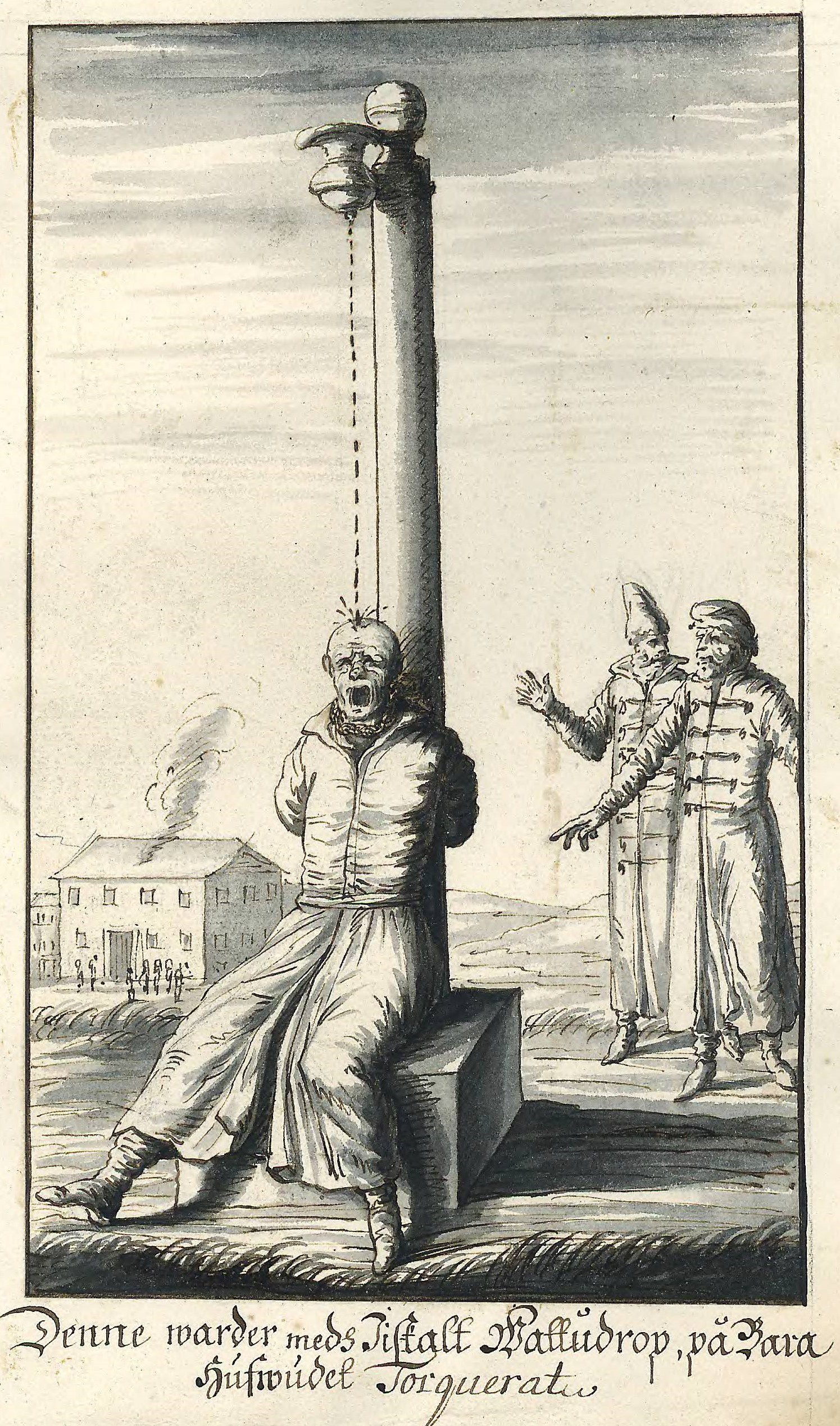 Пытка водой.